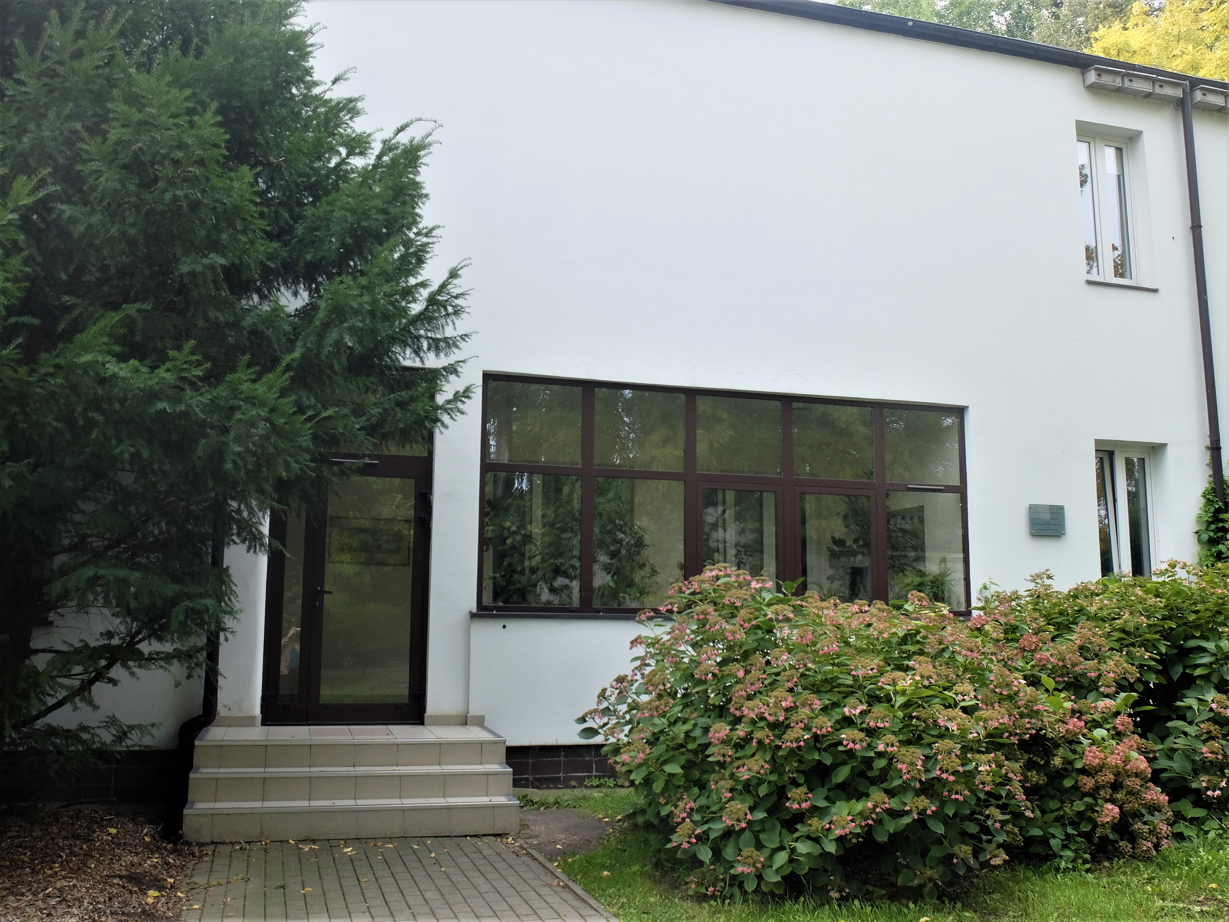 Willa rodziny Żabińskich, którzy ukrywali Żydów w czasie II wojny światowej w warszawskim ZOO.